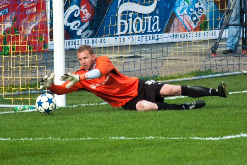 Мартин Богатинов — македонский футболист.